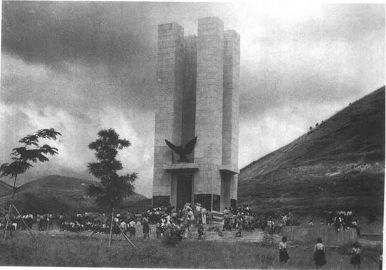 廣州市新一軍印緬陣亡將士公墓四柱紀念塔